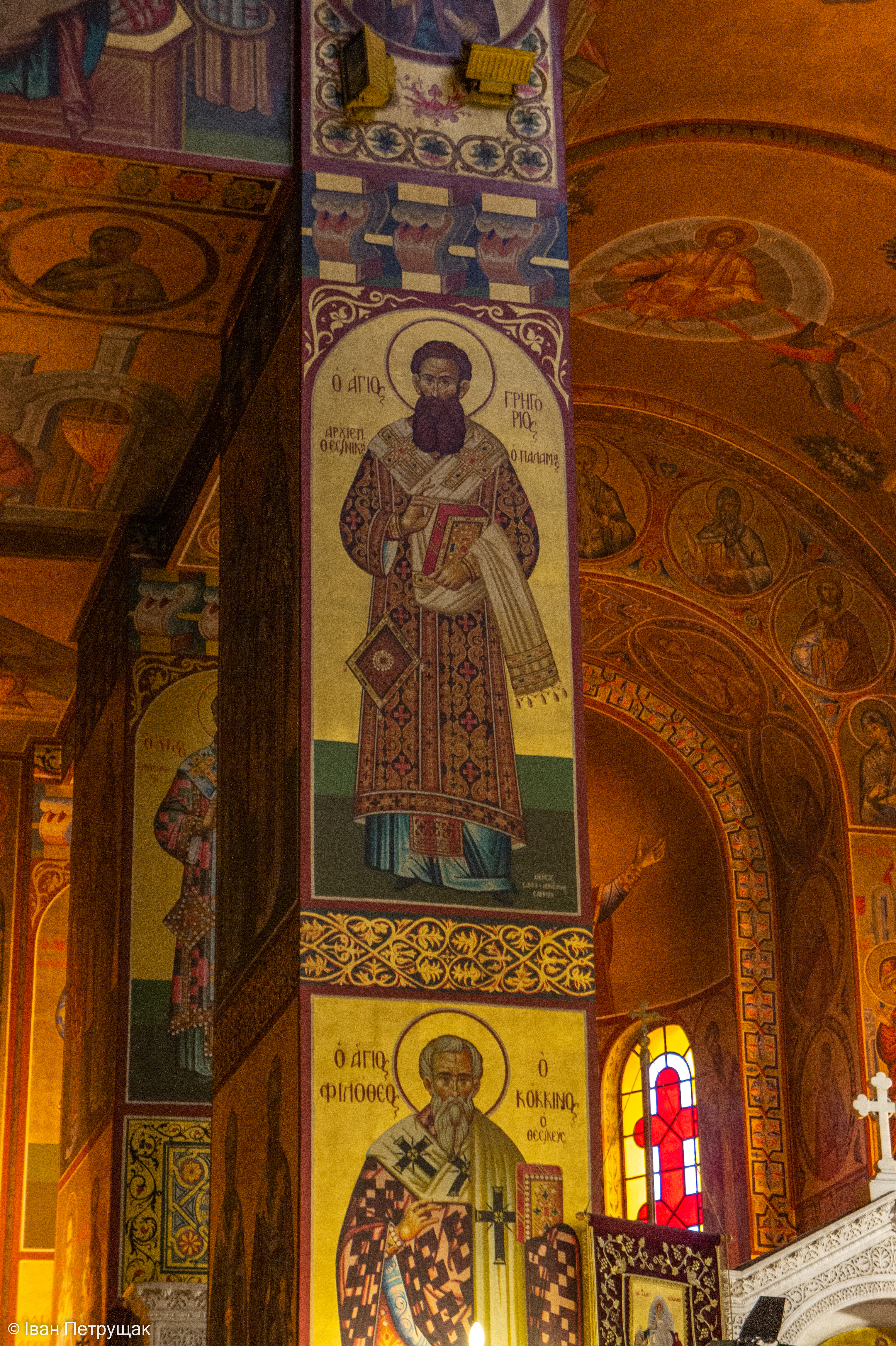 Ікона святого Григорія Палами в храмі на його честь в Салоніках